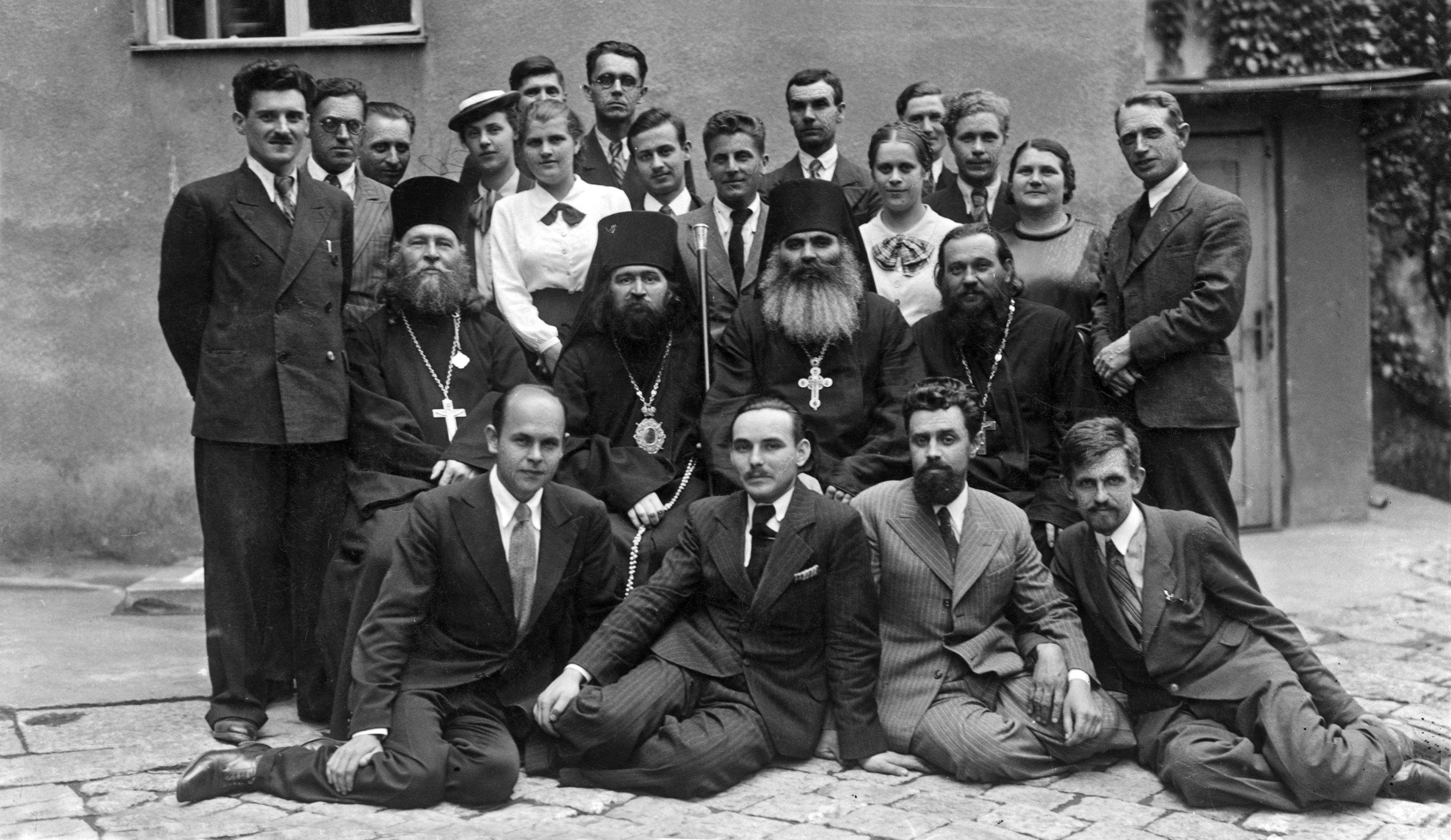 Белград. 1934 г. Новохиротонисанный епископ Иоанн с группой духовенства и студентов Белгдадского богословского факультета.